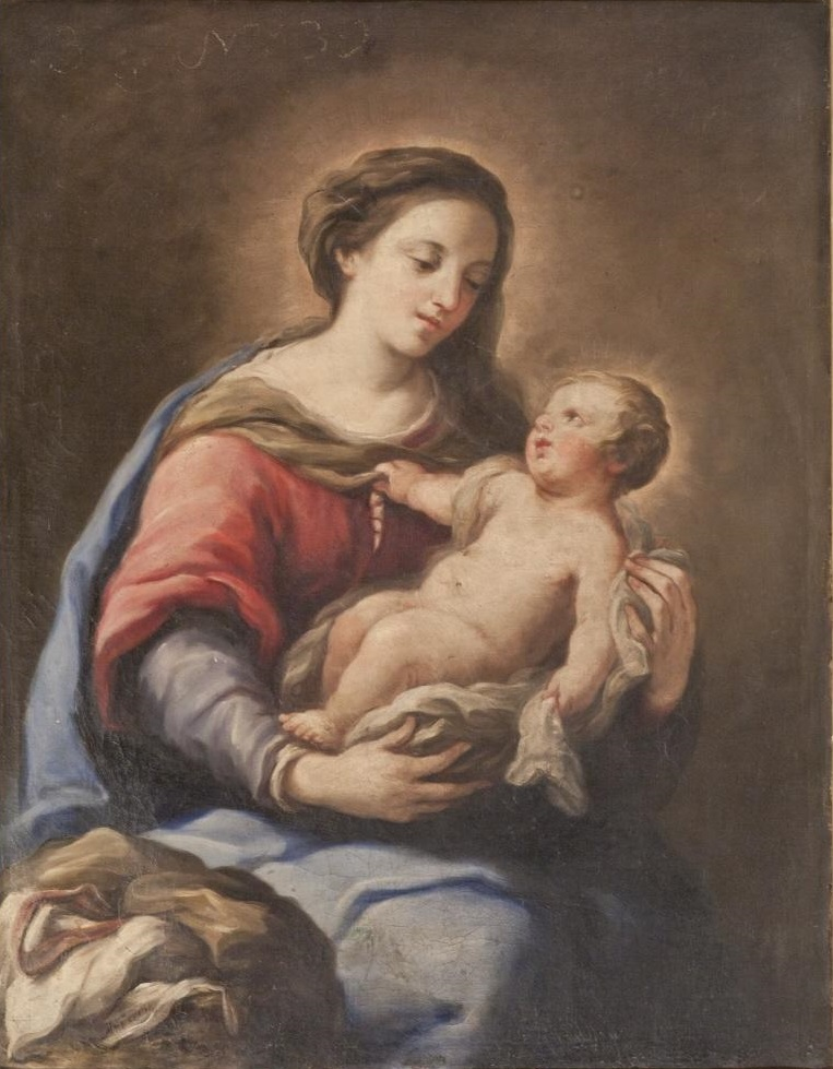 La obra representa a la Virgen María llevando en sus brazos a su hijo, el Niño Jesús.